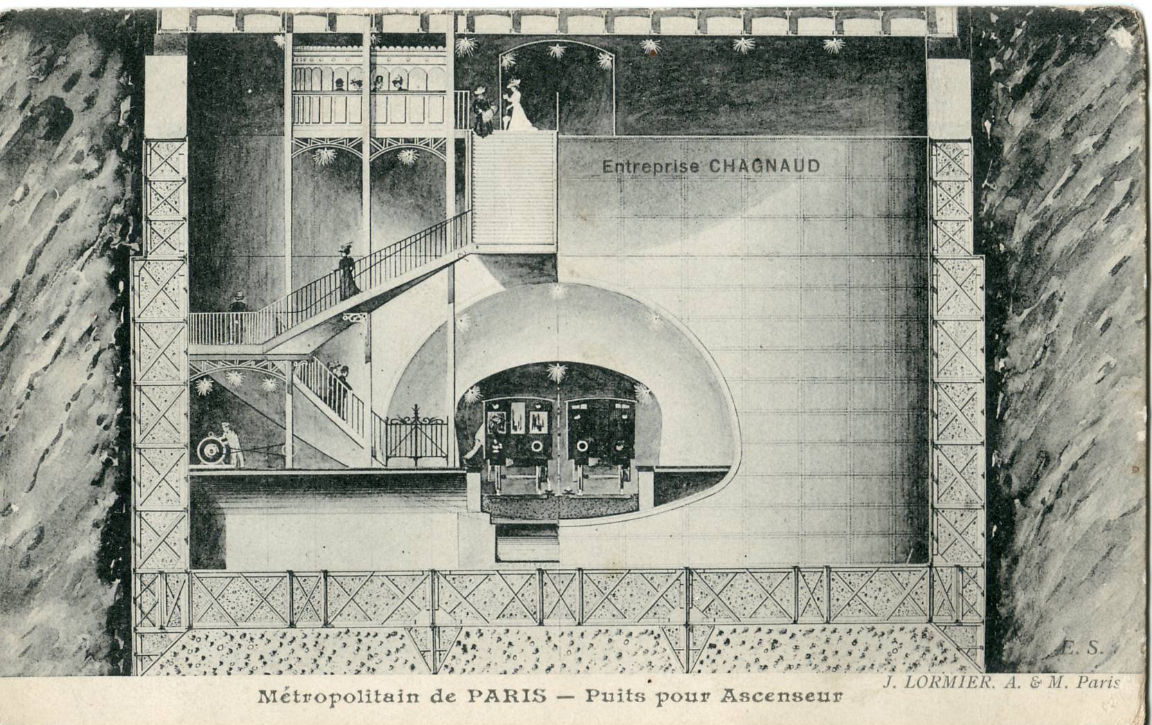 Carte postale ancienne éditée par MalcuitMétropolitain de Paris : coupe d'une station sur puits vertical, telle que Cité ou Saint-Michel (Publicité de l'Entreprise Chaignaud